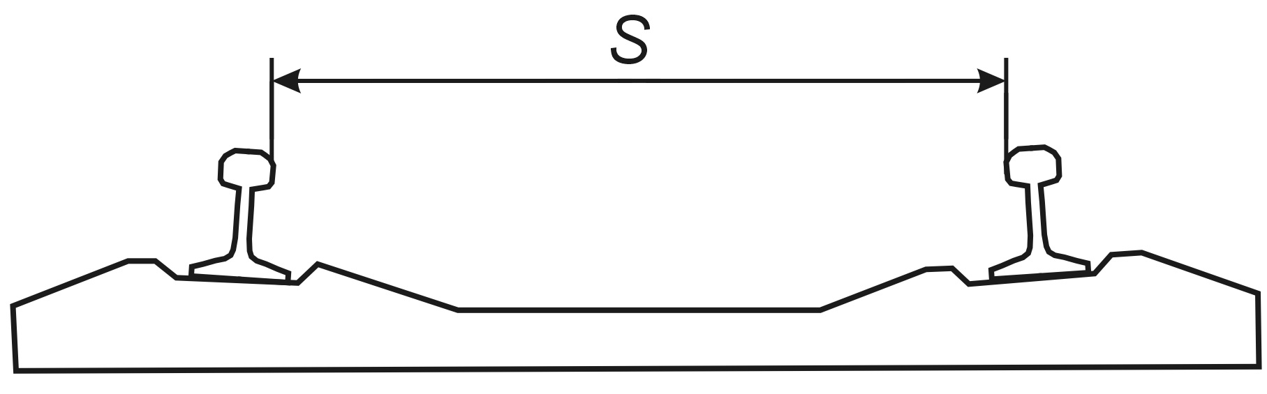 Sliednes platums S